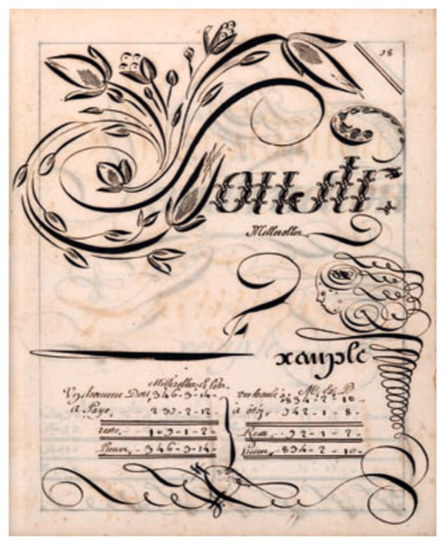 Exemple de calligraphie de Pierre Simian, calligraphe à Marseille (1772)